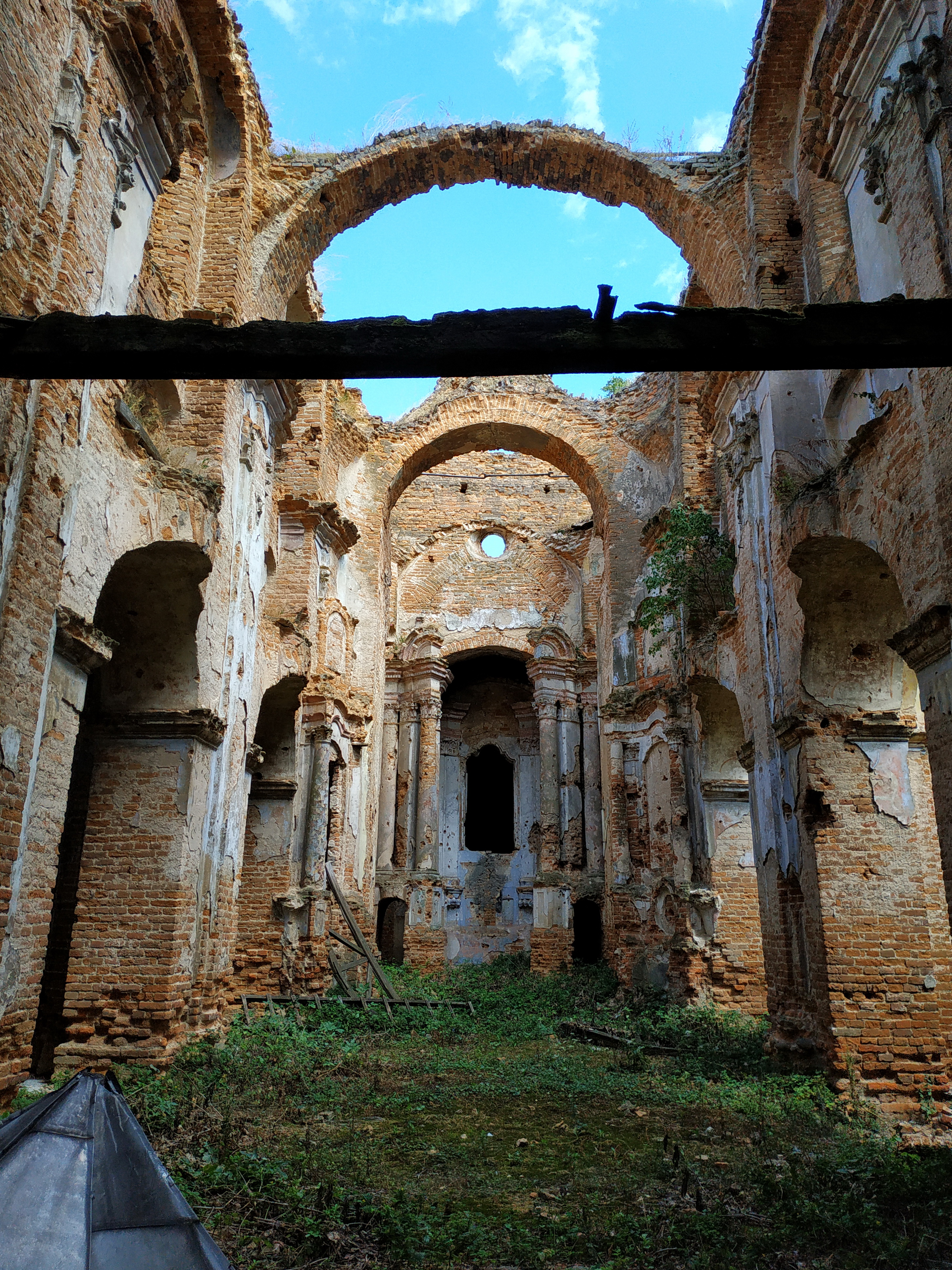 Загорівський монастир (1566 рік) - вигляд всередині - Новий Загорів (на південній околиці села) Локачинський район Волинська область Україна